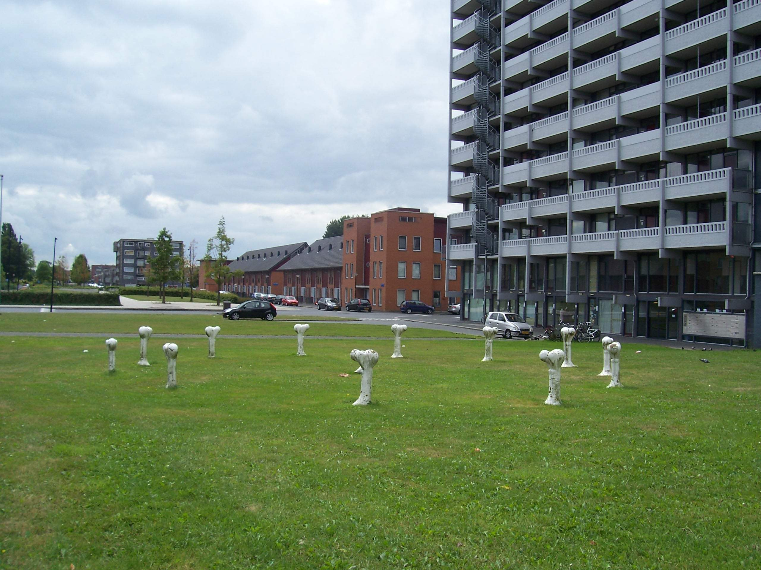 Twaalf bokspringers, verplaatst van Echtenstein, Keilbergpad (gesloopte flat) naar Entabeni, (Laag Echtenstein). P. Verwilligen.